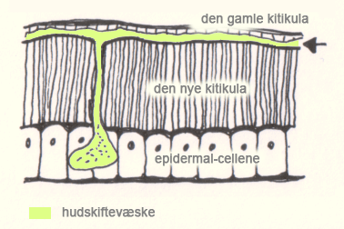 Hudskifte prosessen hos leddyr - NORSK TEKST